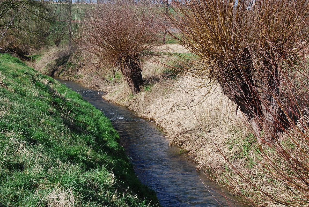 Limburgs: Selzerbaek of Sinselbach bie Partei